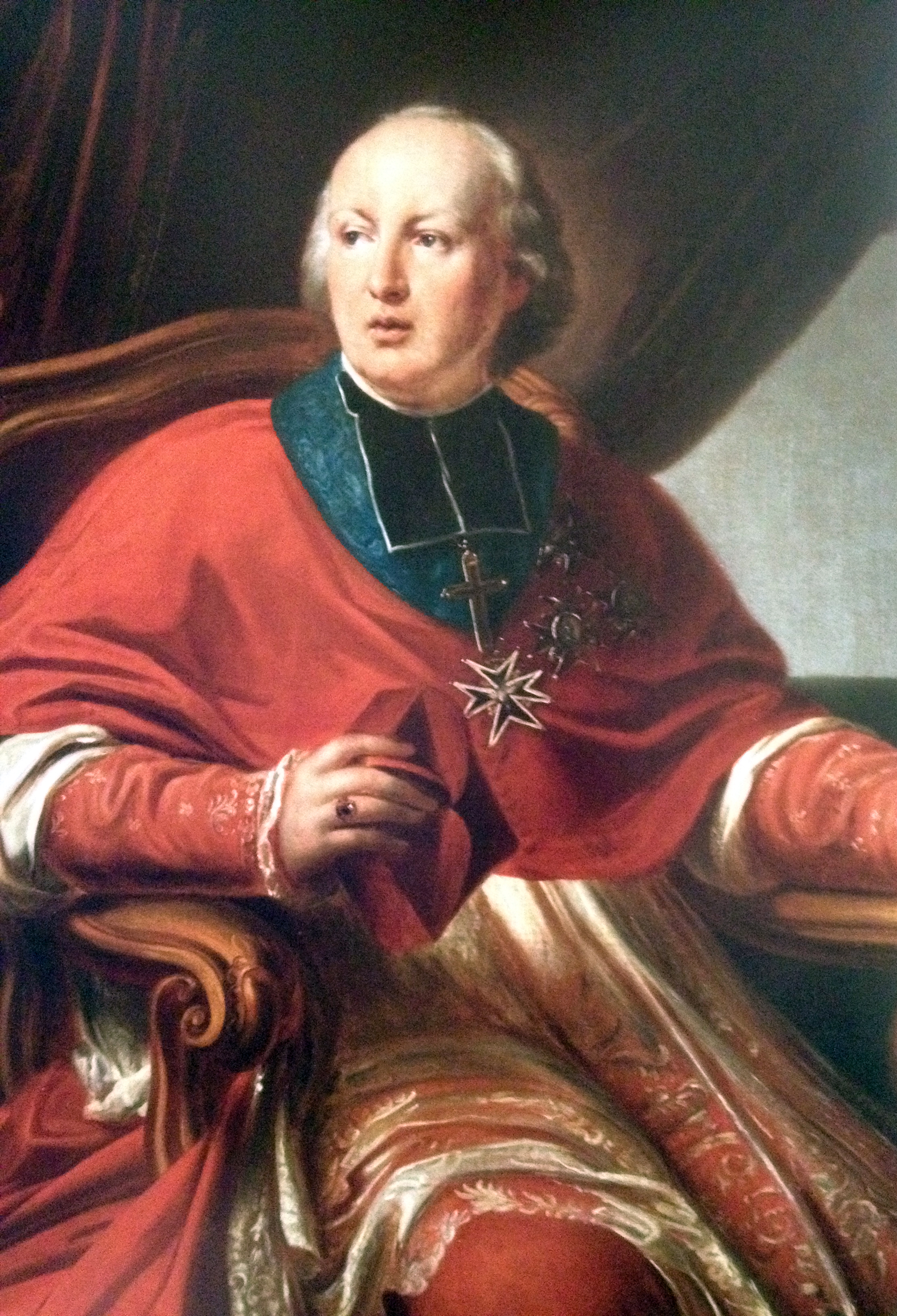 Gustave Maximilien Juste de Croÿ-Solre, portrait d'Hippolyte de Mahy en 1833.